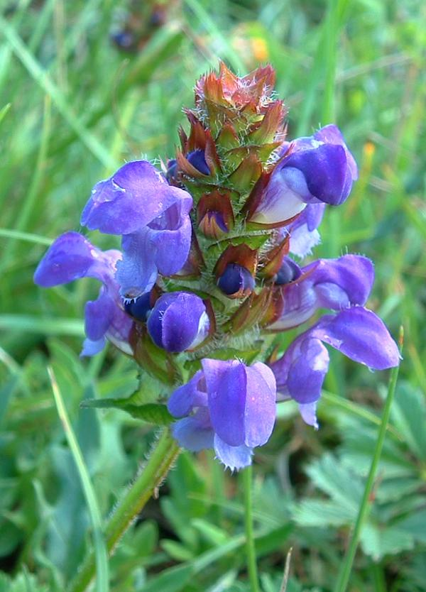 Brunelle à grandes fleurs, Bucey-lès-Gy